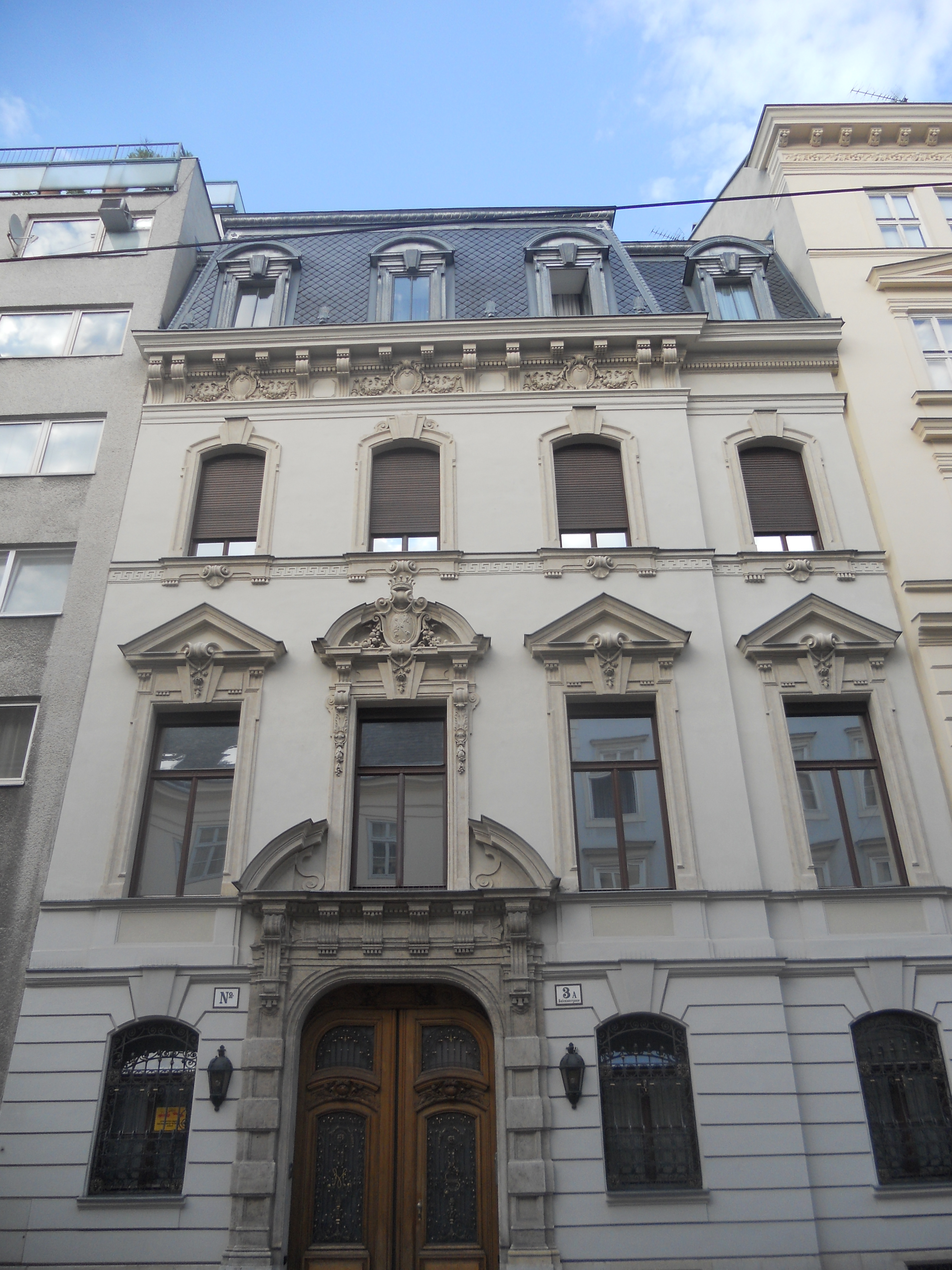 Haus Salesianergasse 3a in Wien, Teil des ehemaligen Palais Schnapper-Weisweiler